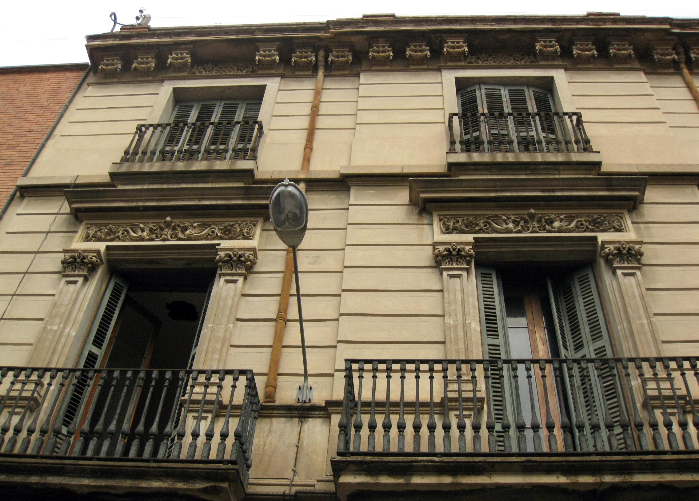 Casa Guardiola, al carrer de Sant Antoni núm. 62 (Terrassa). Edifici eclèctic de final del segle XIX.